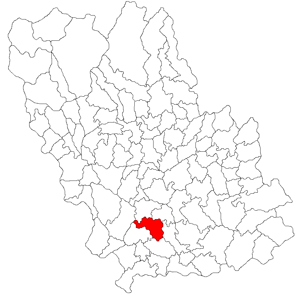 Categorie:Hărţi ale judeţului Prahova